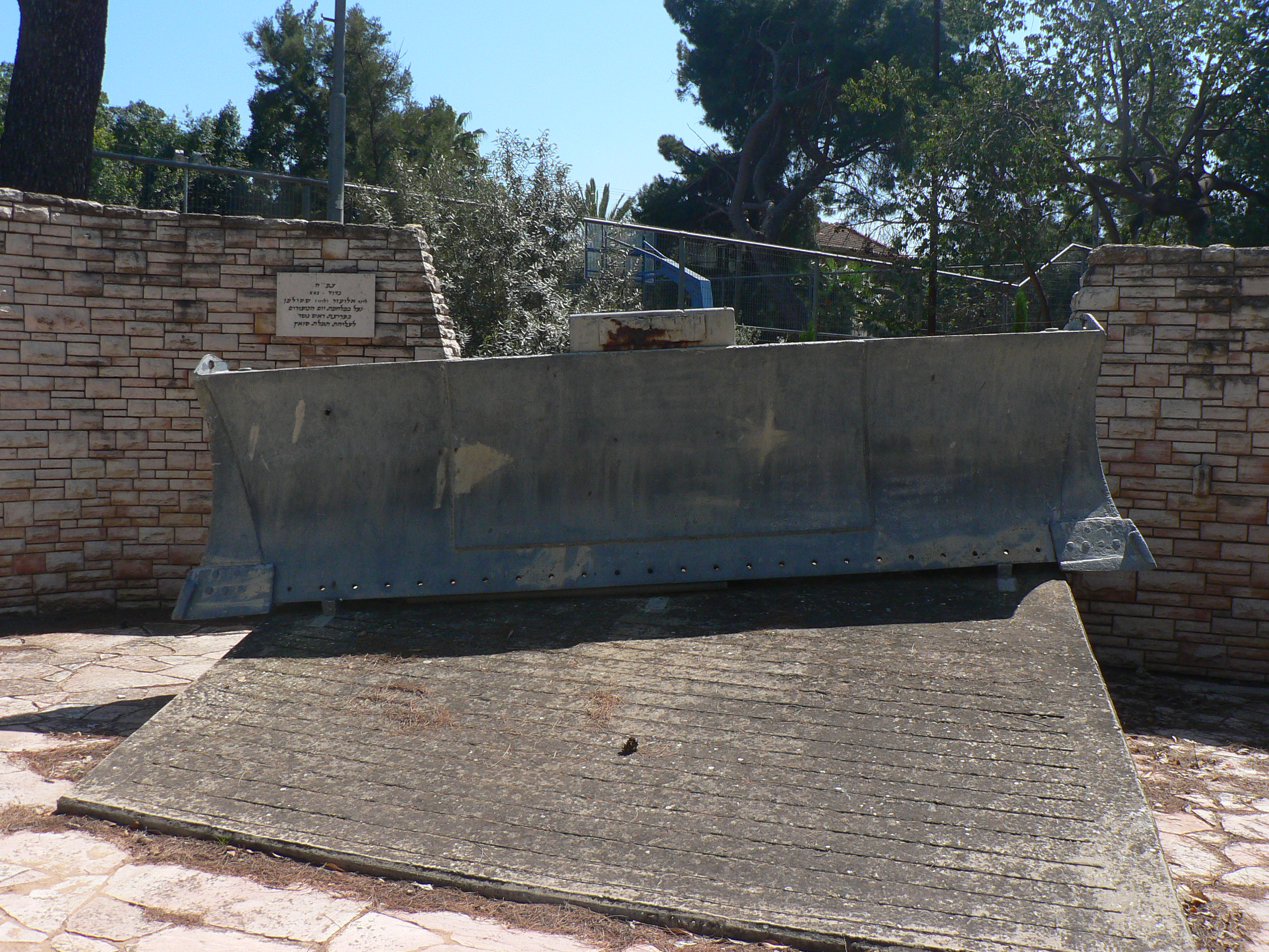 Monument for Israel Engineerings Corps, Battalion 605, Engineering Vehicles platoon in Bney Atarot, Israel אנדרטה לפלוגת הצמ"ה של גדוד 605 של חיל ההנדסה במושב בני עטרות